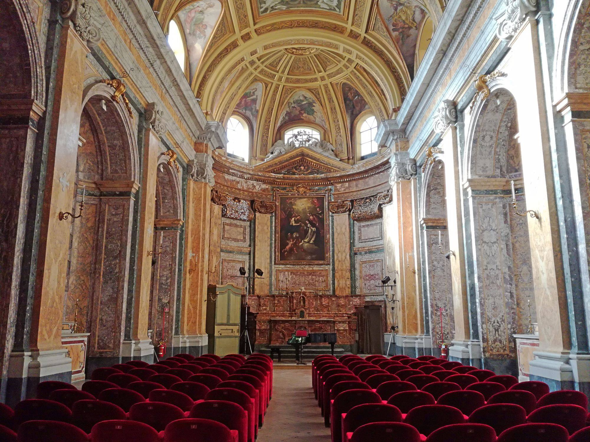 Scorcio dell'interno (abside), Santa Caterina da Siena (Napoli)